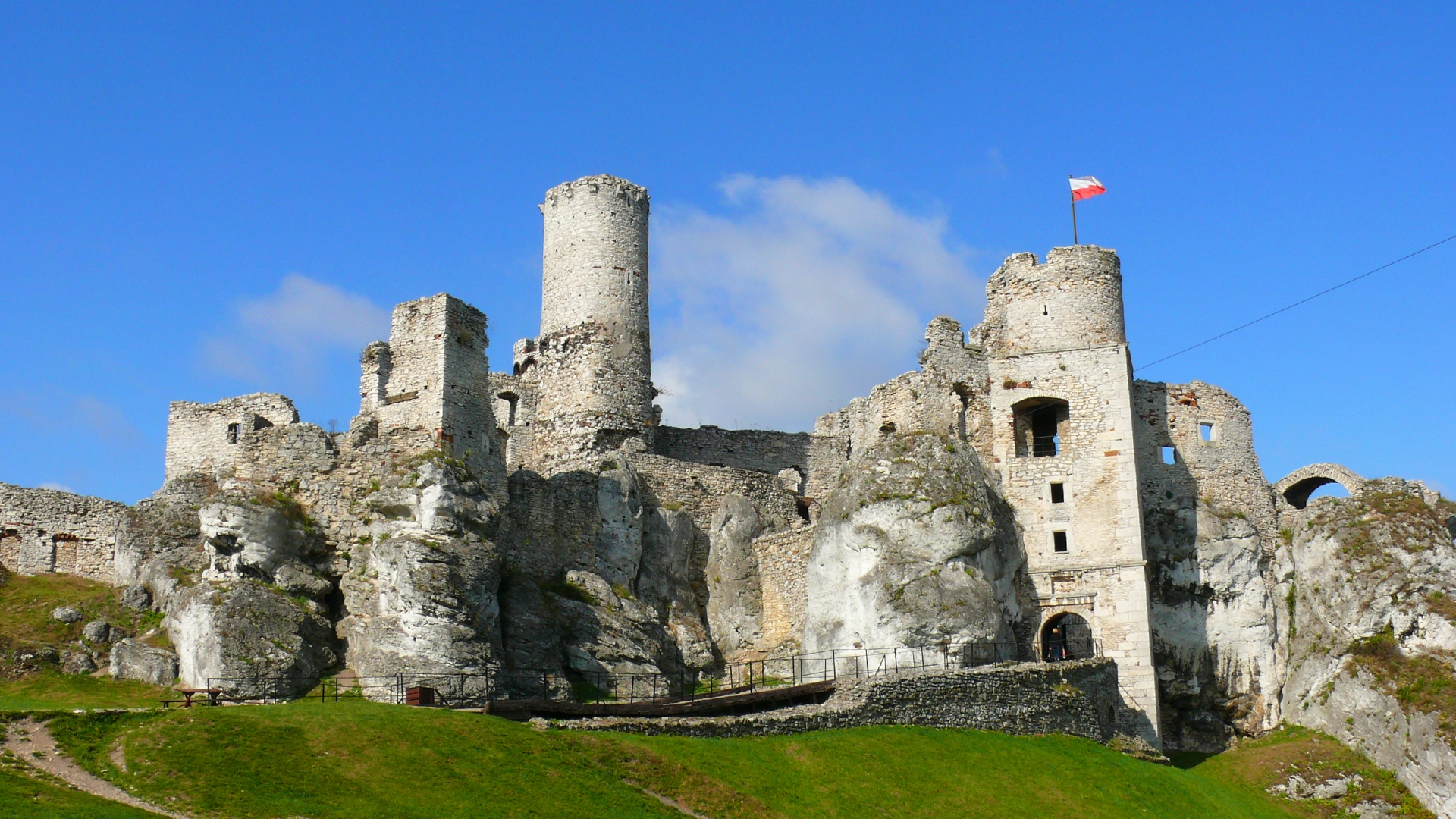 Ogrodzieniec, zamek Bonerów z XV w., obecnie w ruinie